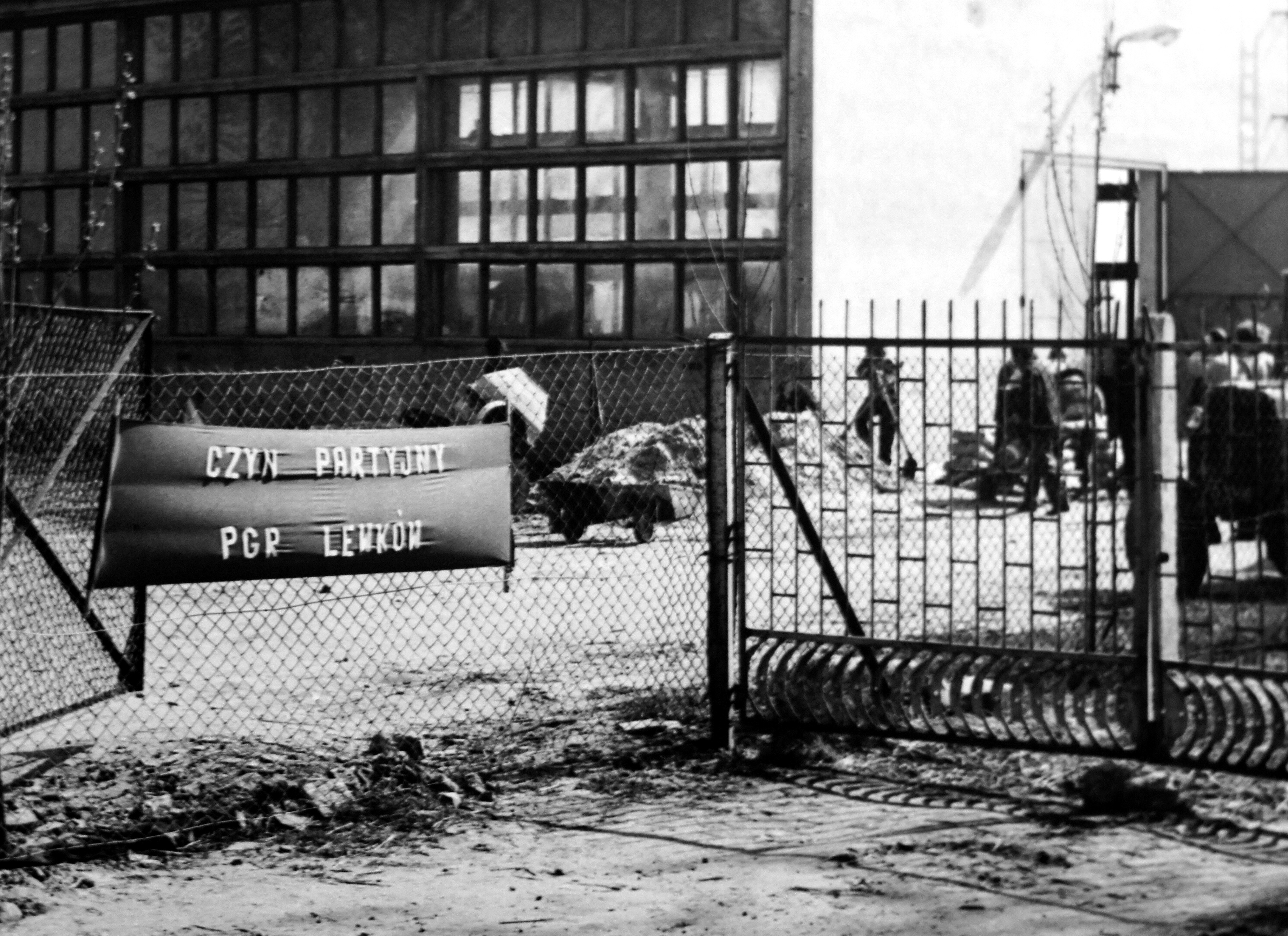 II połowa lat 70. XX w. Czyn partyjny w PGR Lewków (województwo kaliskie).